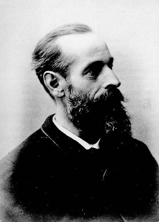 Henri Zuber, in Biographies alsaciennes avec portraits en photographie, série 4